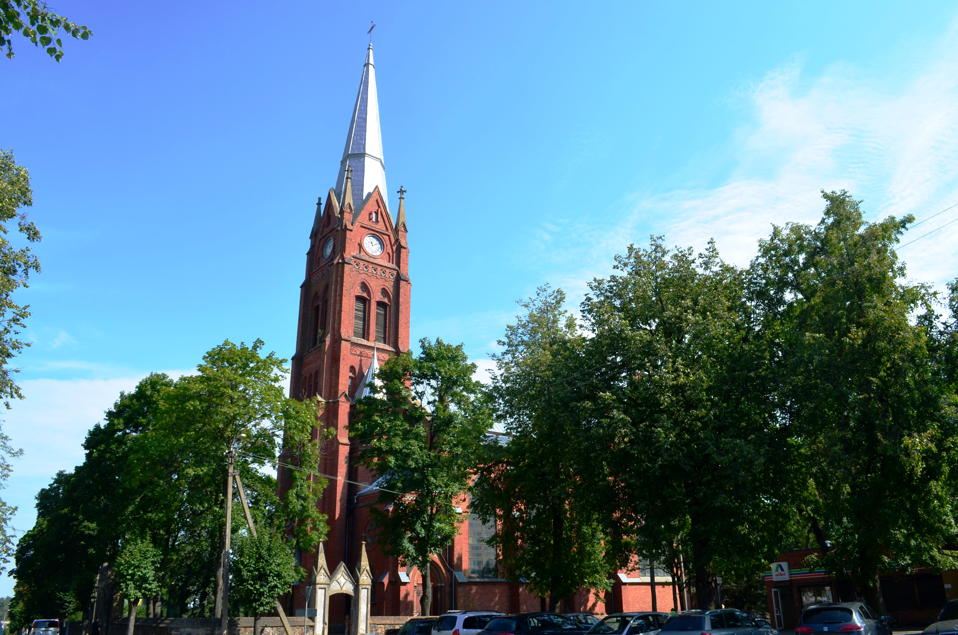 Ramygalos bažnyčia, Panevėžio r.